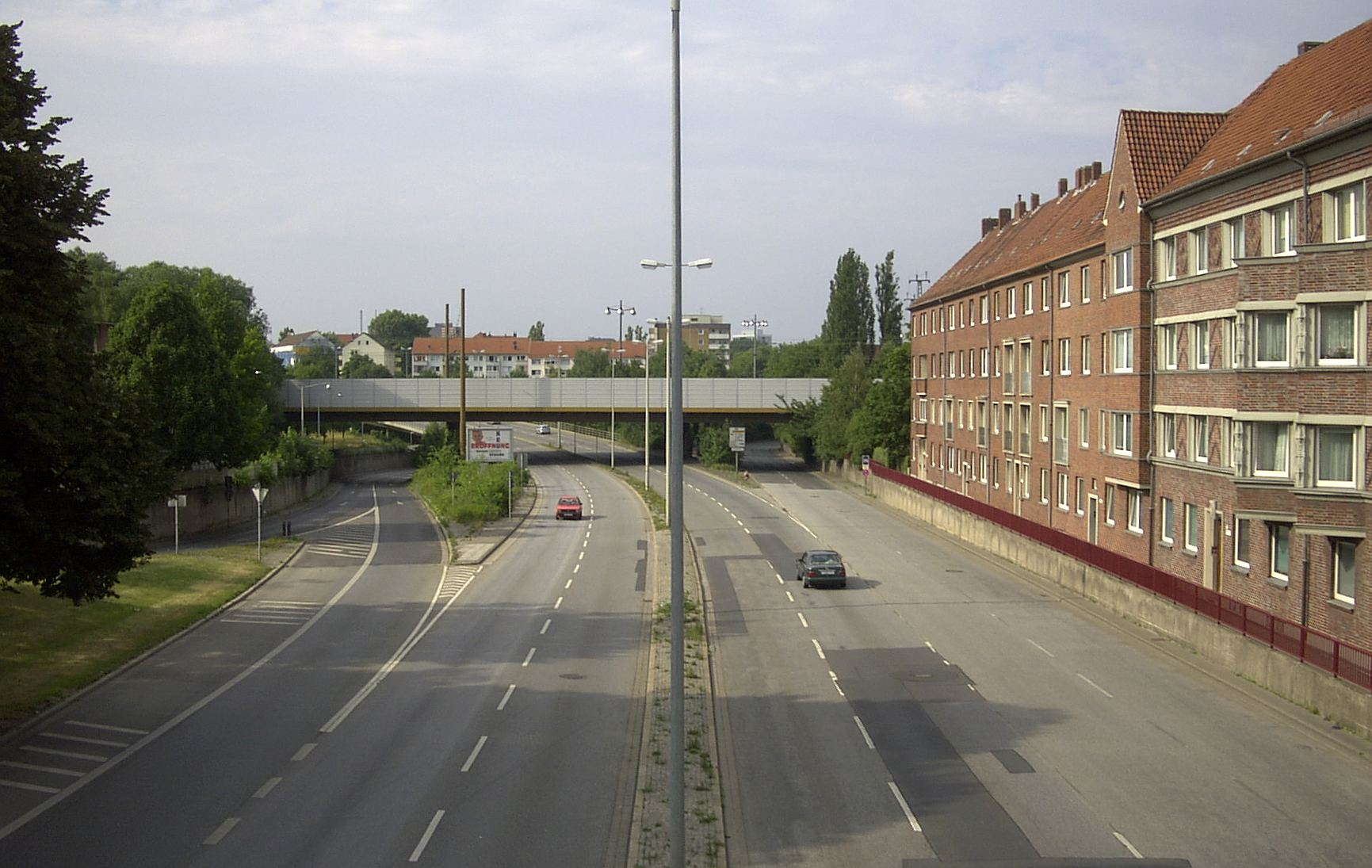 Straßenbauwerk "Kaisergabel" in Hannover am 29.6.2003 von der Fußgängerbrücke am Friedrich-Ebert-Platz aus gesehen. In der Mitte der Westschnellweg. Links und rechts die Ausfädelungen zur Ritter-Brüning-Straße hin.